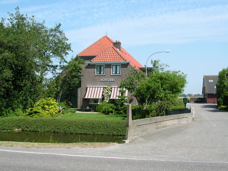 Boerderij-huis in de polder Koegras, bij Julianadorp Farm(house) in the Koegras polder, near Julianadorp